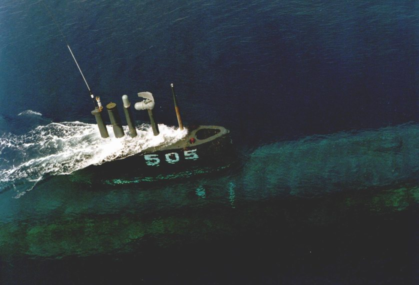 Il sommergibile Attilio Bagnolini